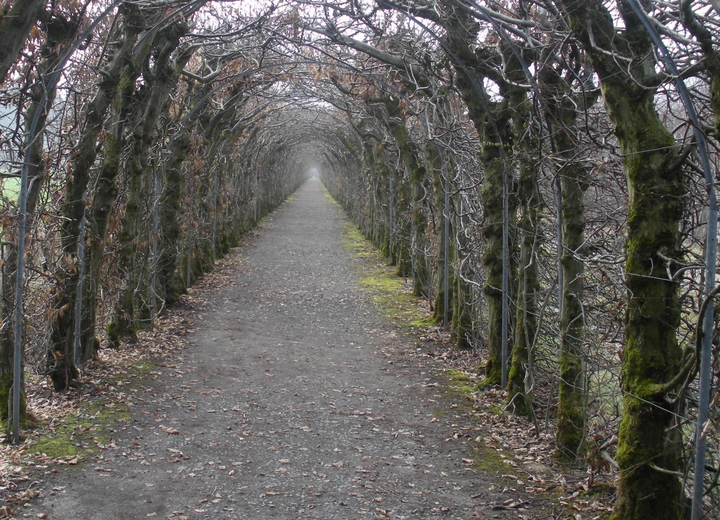 Cette charmille, longue de 573 mètres en ligne droite, constitue l'une des plus longues promenades de ce type en Europe. Planté pour sa majeure partie en 1885, ce véritable tunnel végétal se compose de 4.700 plants de charmes plantés en double alignement et conduits pour former un berceau . Ce site classé a été restauré en 1992. La charmille est régulièrement entretenue par les élèves du Centre provincial d’Enseignement agronomique de La Reid.